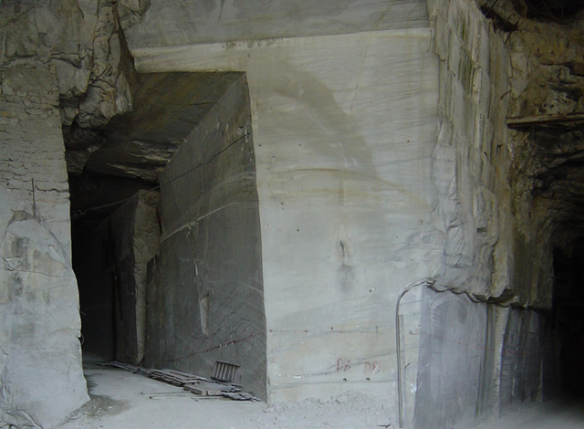 Eingang Weiswasserbruch Laas (Südtirol)